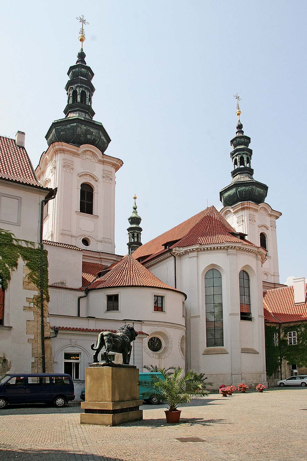 Bazilika Nanebevzetí Panny Marie na Strahově - pohled ze dvora autor:Prazak date: 7. 2006